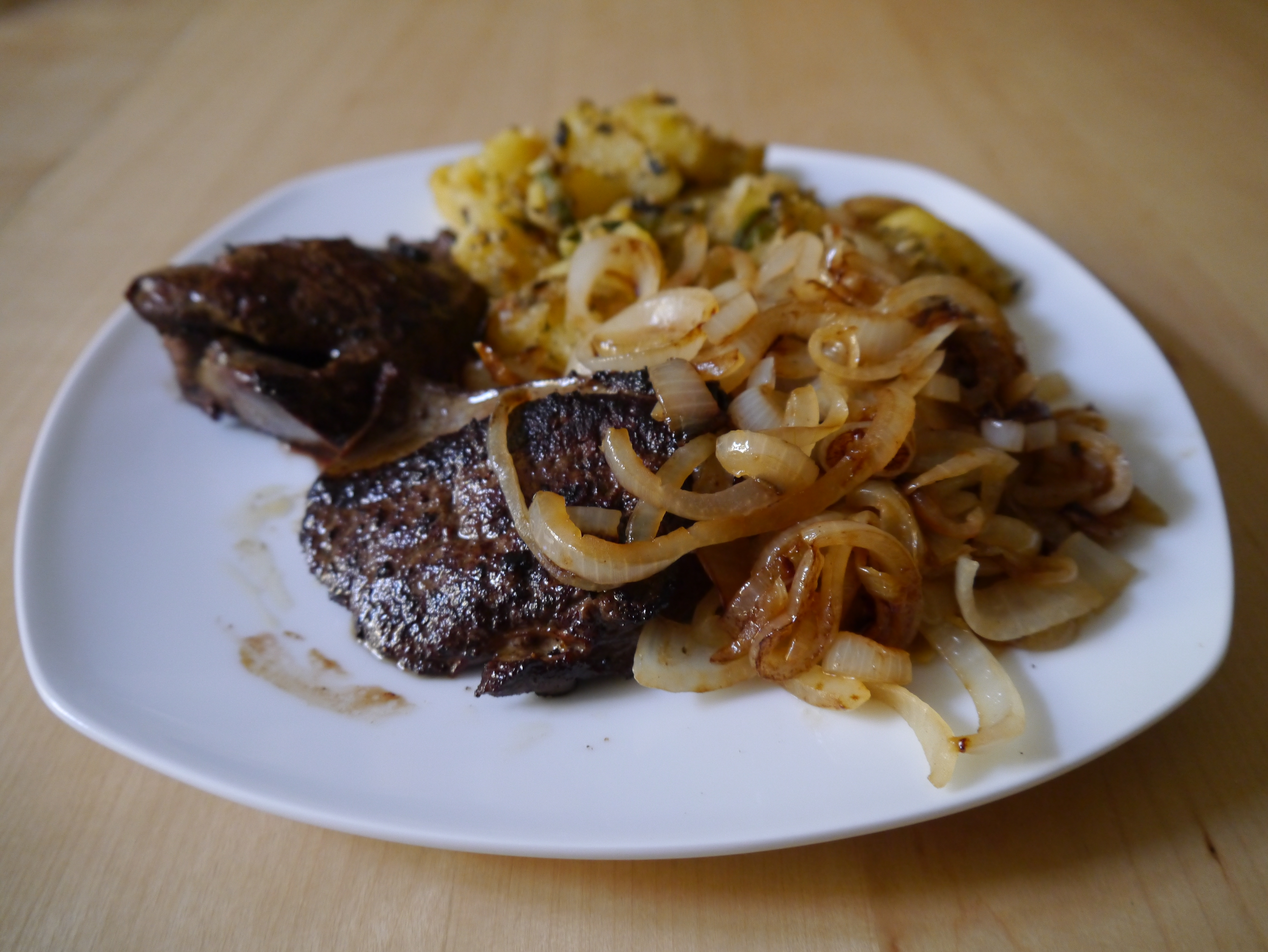 Rinderleber mit Kartoffel-Zuccini-Beilage und geschmorten Zwiebeln.